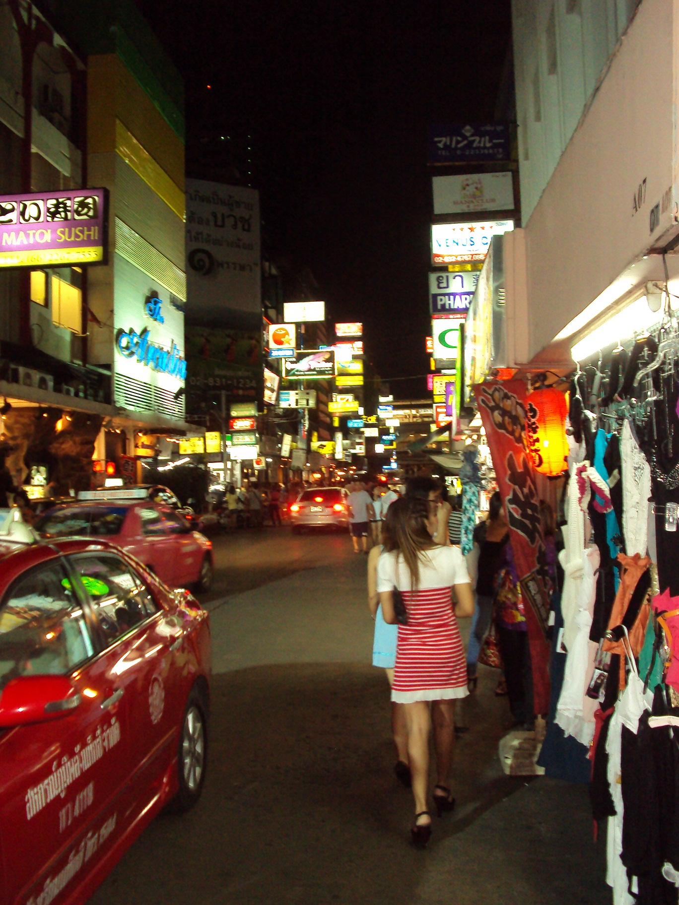 Soi Thaniya By Night